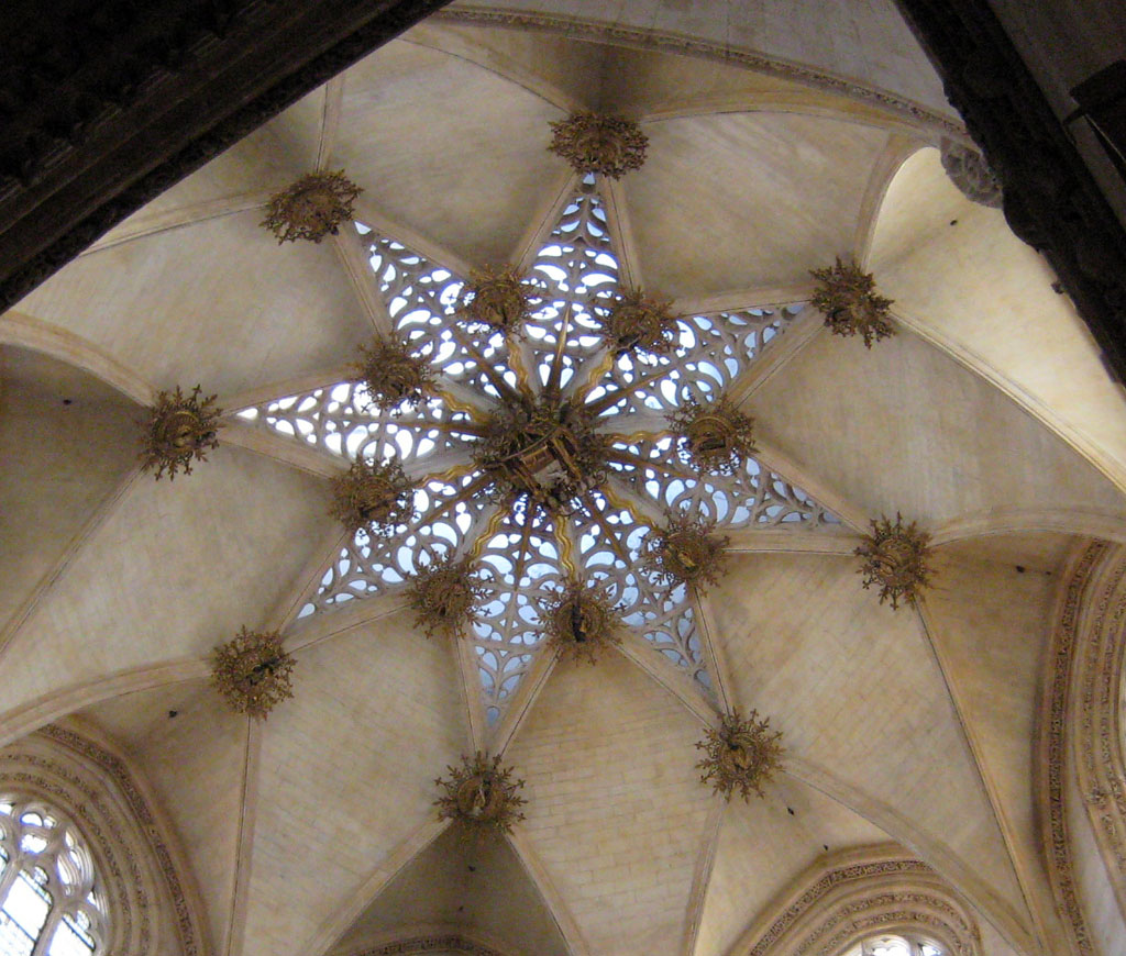 Kathedrale Burgos, Capilla del Condestable